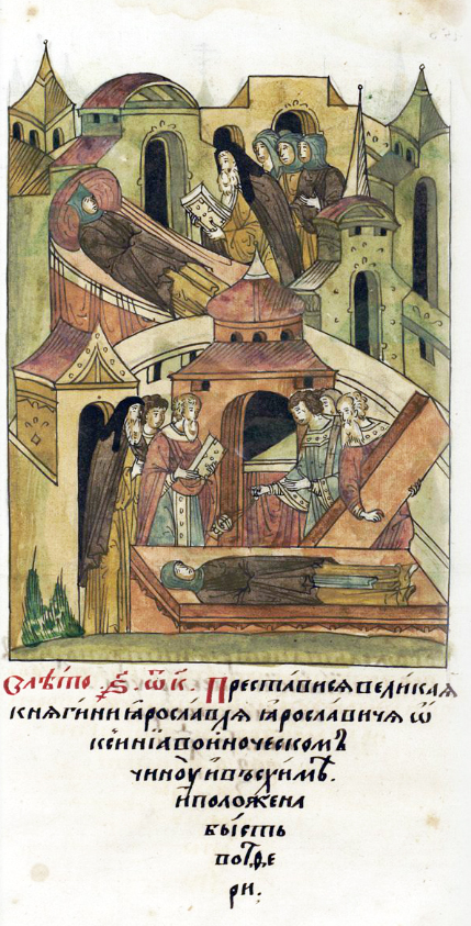 ЛИЦЕВОЙ ЛЕТОПИСНЫЙ СВОД В 6820 году. Преставилась великая княгиня Ярослава Ярославича, Оксиния, в иноческом чину и в схиме и положена была в Твери.